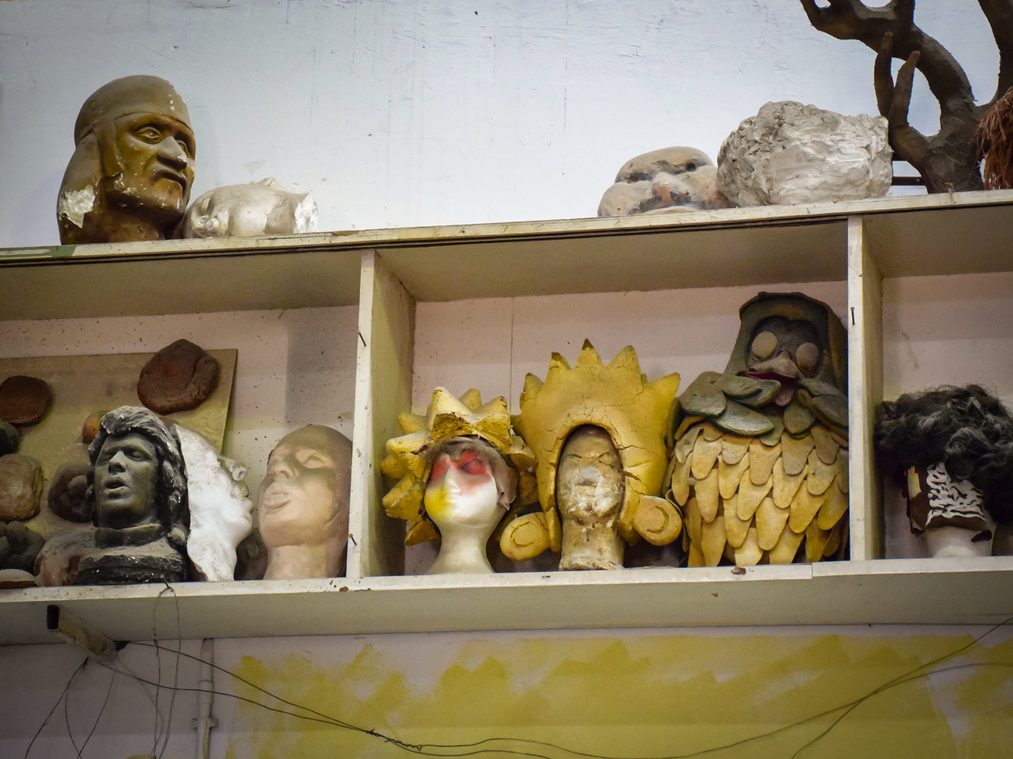 אדון ינשוף במחסני הטלויזיה החינוכית ברחוב קלאוזנר 14 תל אביב